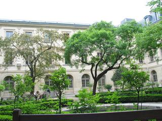 Foto da collezione personale. Â© 2003 Piotr P. Karwasz, rilasciata sotto GFDL. Lo stesso vale per tutte le foto di attingetene liberamente. Piotr P. Karwasz in arte Schopenhauer 21:54, Feb 19, 2004 (UTC)